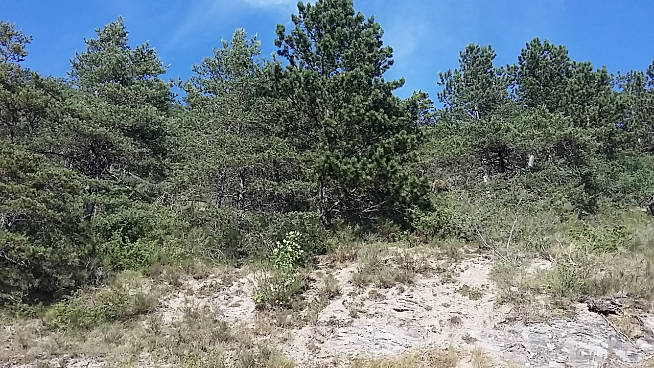 Forêt de bord de route près de Treffort